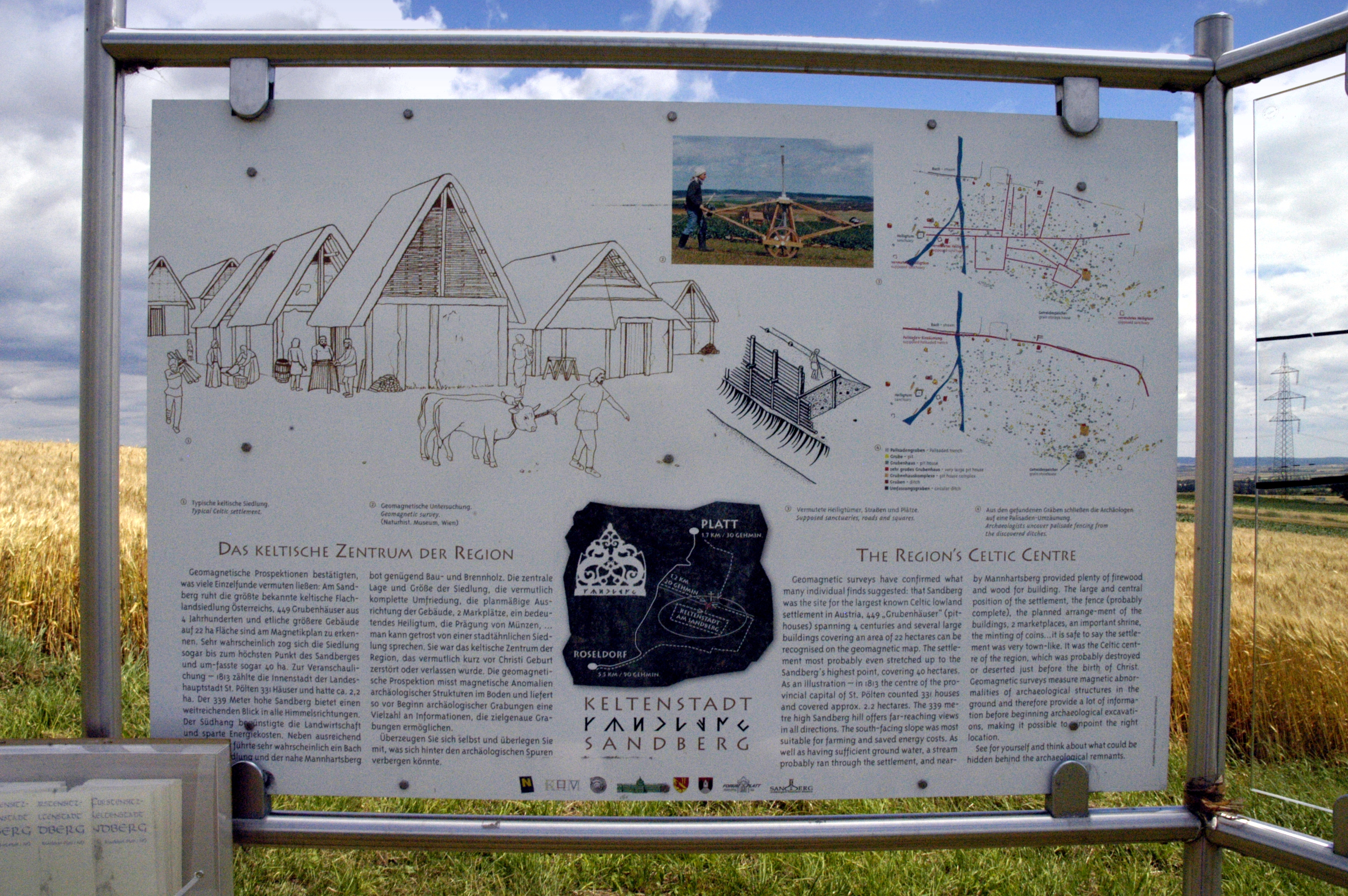 Schautafel bei den Ausgrabungen der Keltenstadt am Sandberg bei Roseldorf (Gemeinde Sitzendorf an der Schmida)